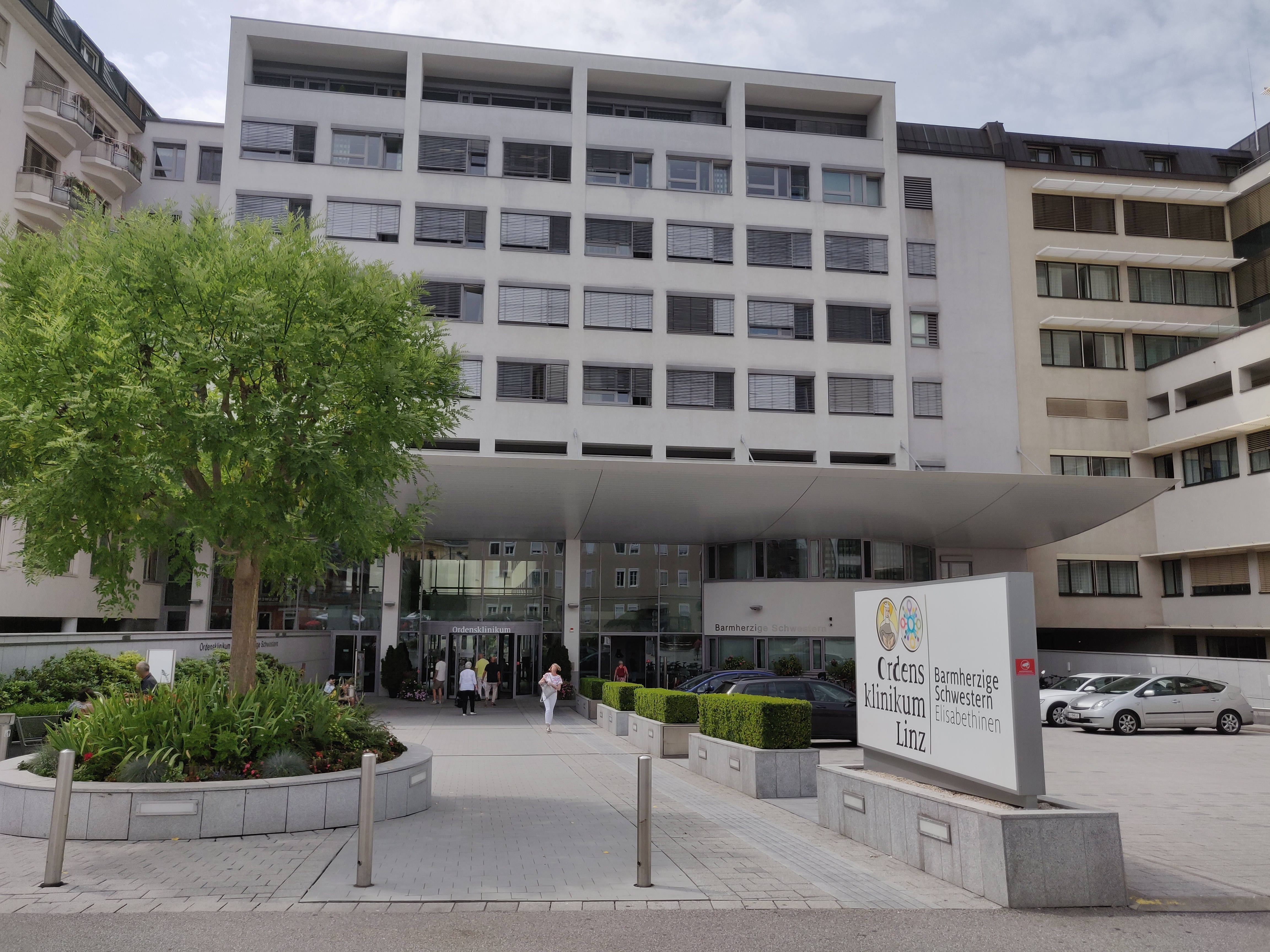 Blick auf den Haupteingang des Krankenhauses der Barmherzigen Schwestern in Linz. Am rechten Bildrand mit beiger Fassadenfarbe ist das angebaute und mit Gängen verbundene Krankenhaus der Barmherzigen Brüder (Linz) zu erkennen.